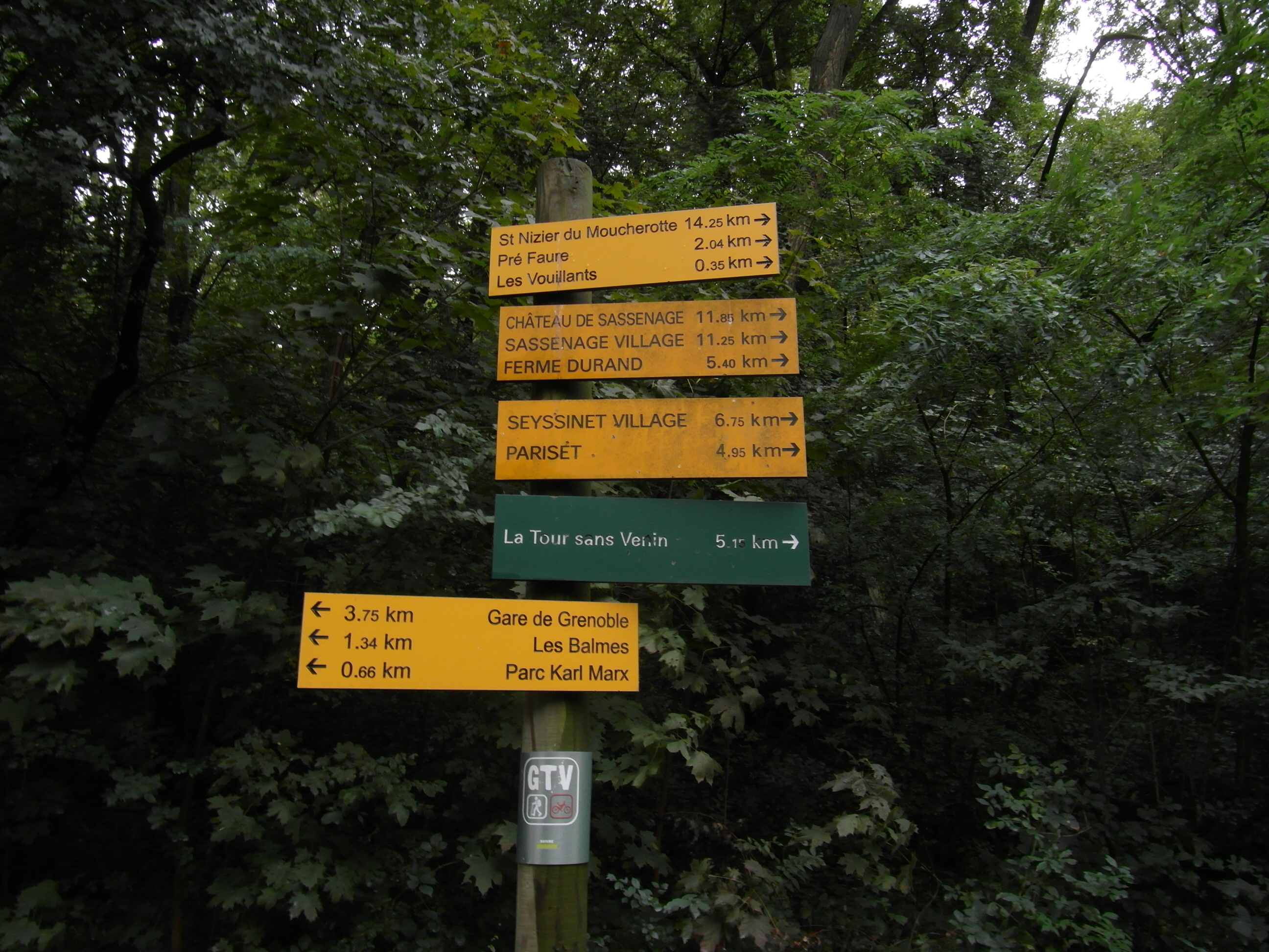 Bois des Vouillants Panneaux